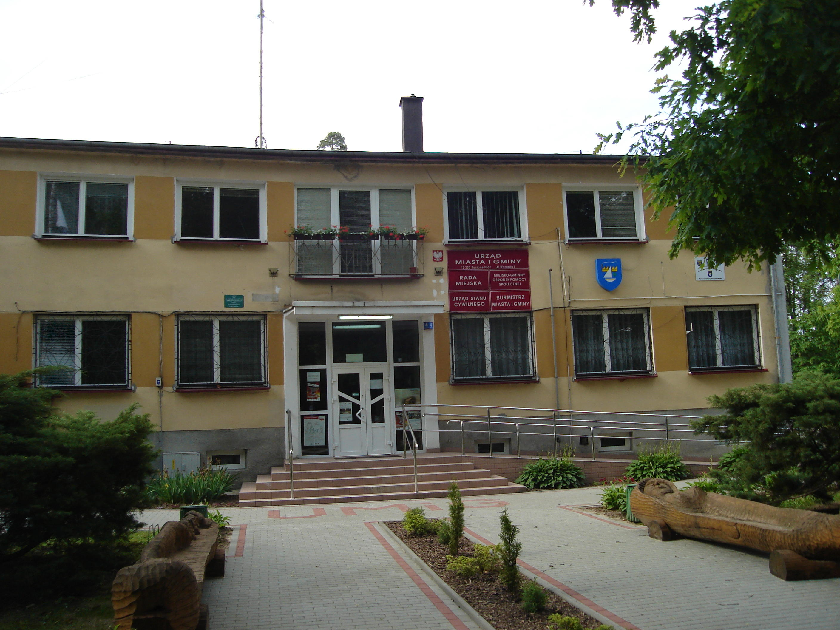 Budynek urzędu miasta i gminy.